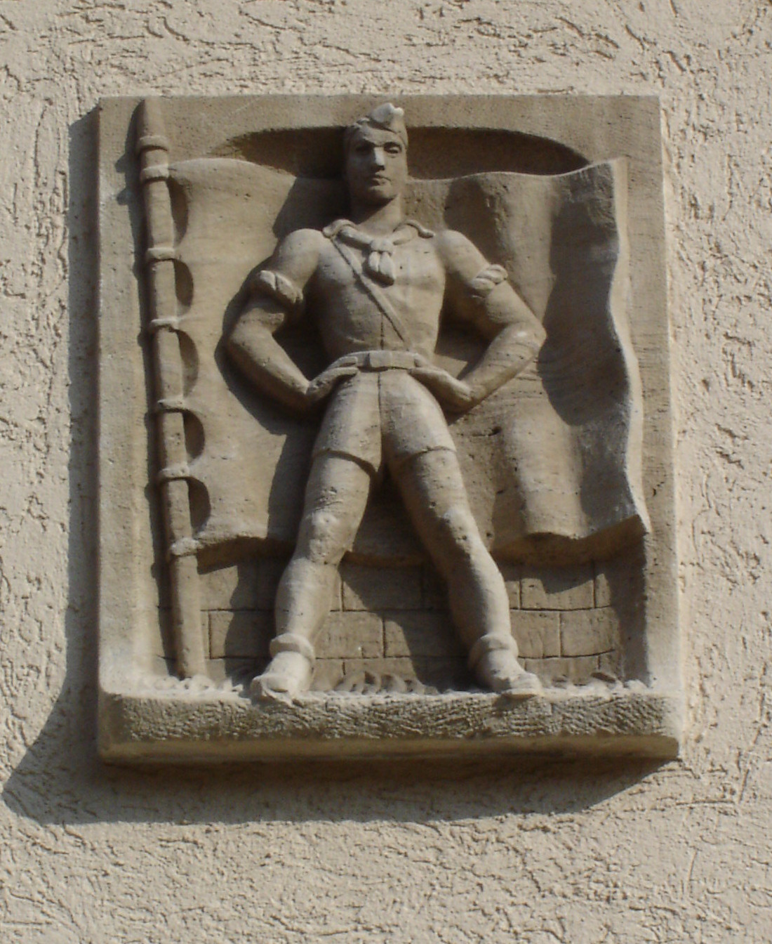 Reliefplatte an der Siedlung am Grazer Damm, Berlin-Schöneberg Selbst erstellt, 28. September 2006 Autor: BishkekRocks